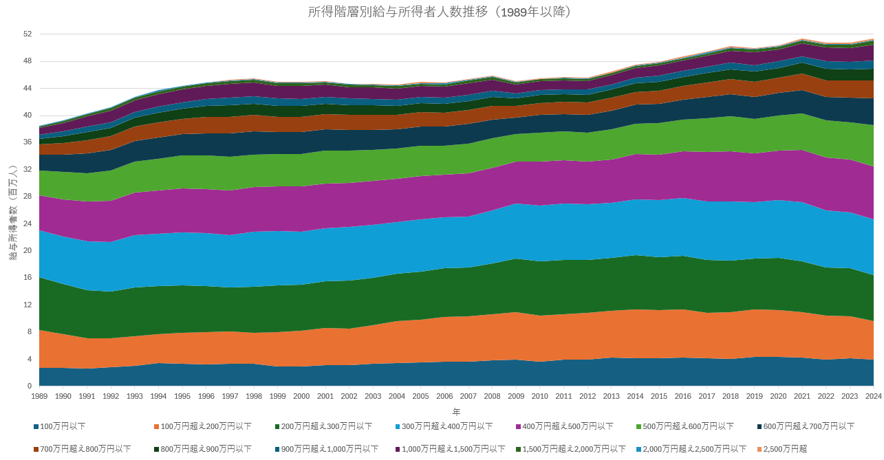 1989年以降の給与所得者の所得階層別人数推移